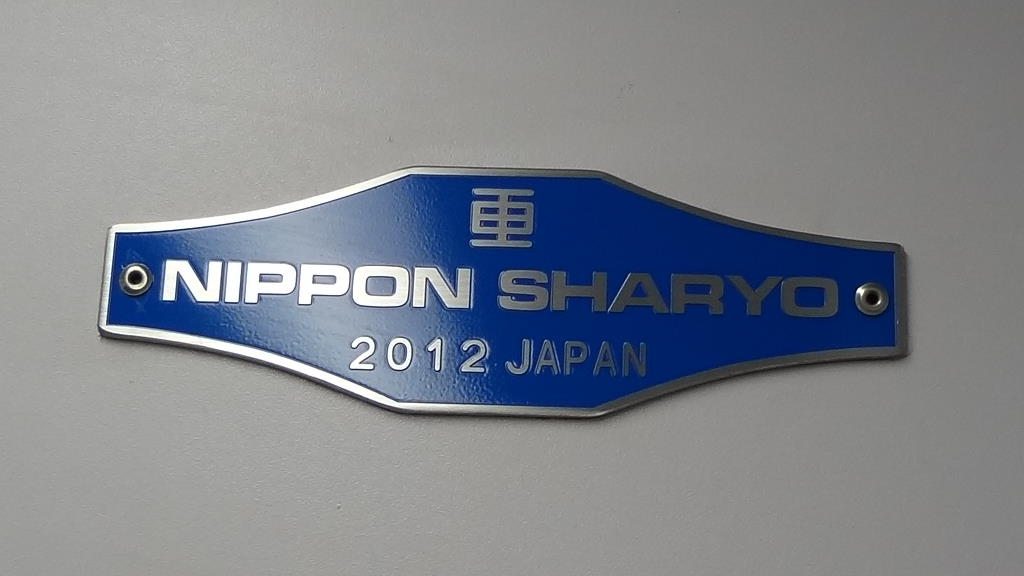 臺灣鐵路管理局EMU800型電聯車ED801車廂內的日本車輛銘板。